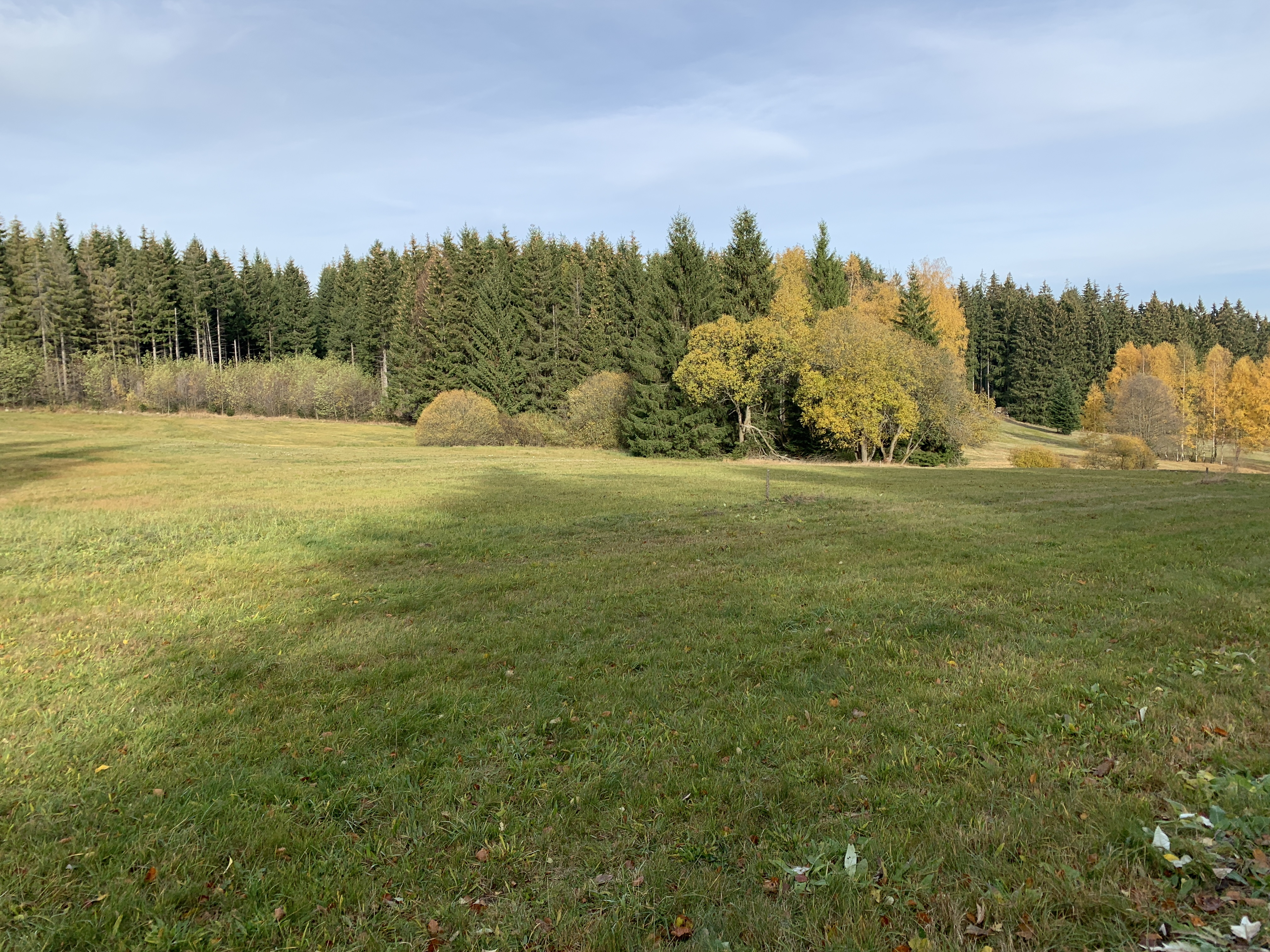 Naturschutzgebiet Wettertannenwiese an der S 274 zwischen Sosa und Schwarzenberg